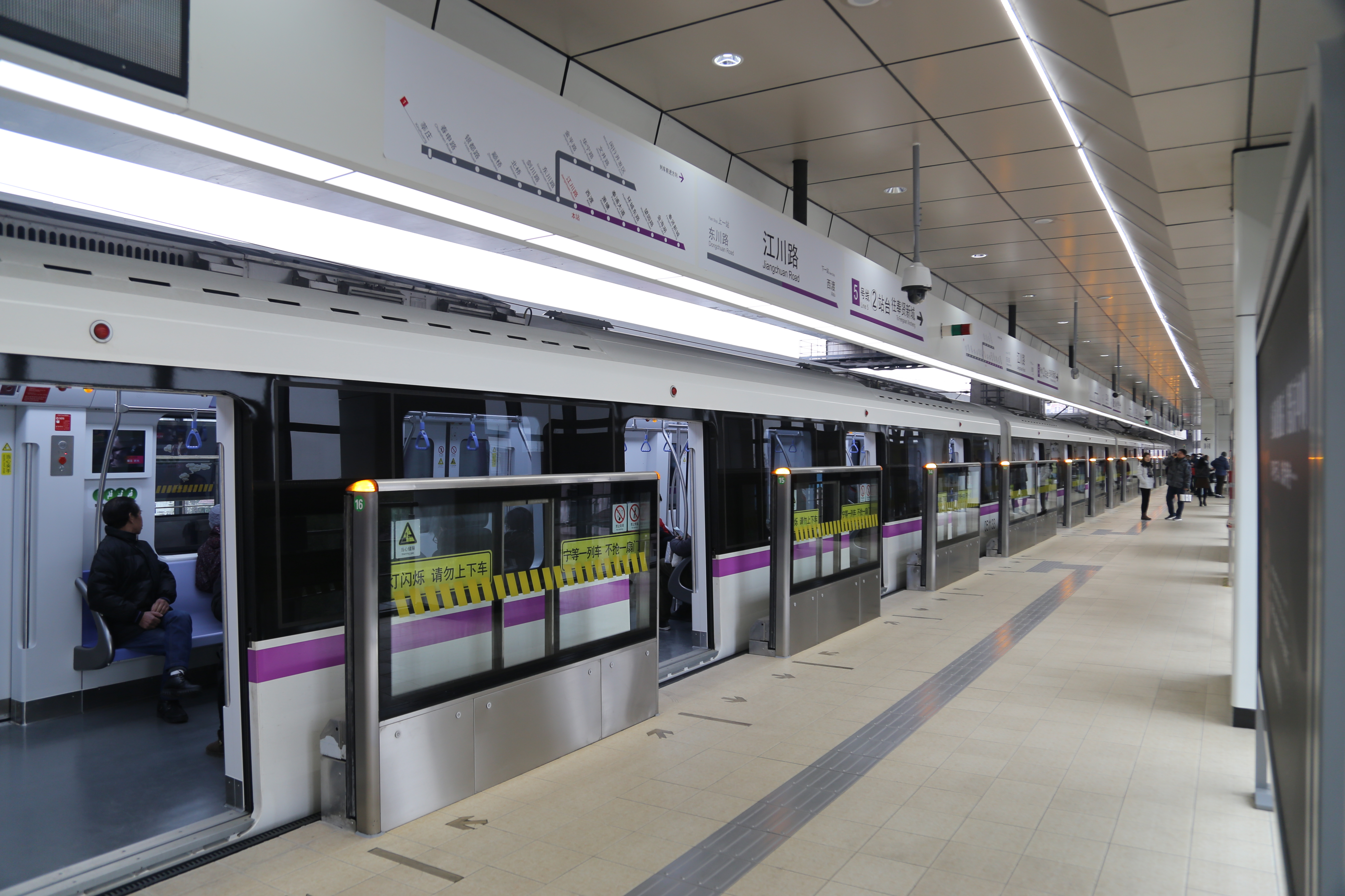 江川路站站台